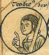 Thierry Ier de Lorraine